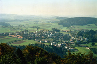 Schliern